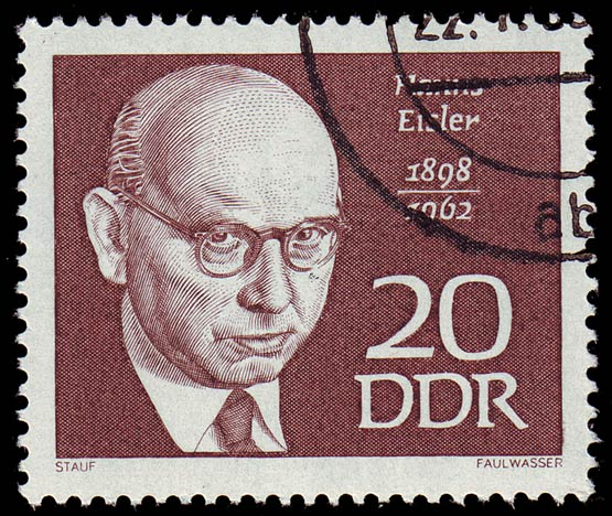 Hanns Eisler (1898–1962), compositeur allemand